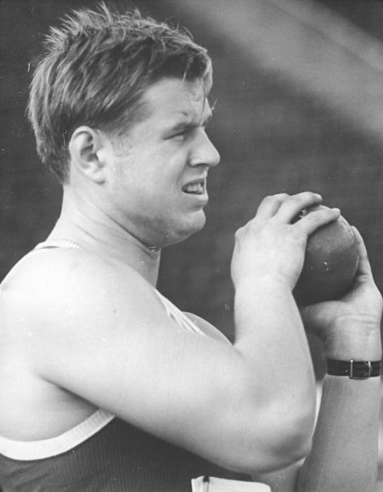 Hartmut Briesenick Zentralbild Koch wen-gü 17.02.1969 Berlin: Deutsche Leichtathletik-Hallenmeisterschaften der DDR am 16.02.1969 in der Dynamosporthalle. Im Kugelstoßen erkämpfte sich in der neuen europäischen Hallenbestleistung mit 19,58m der 19jährige Hartmut Briesenick (unser Archivbild) von SC Dynamo Berlin den ersten Platz.